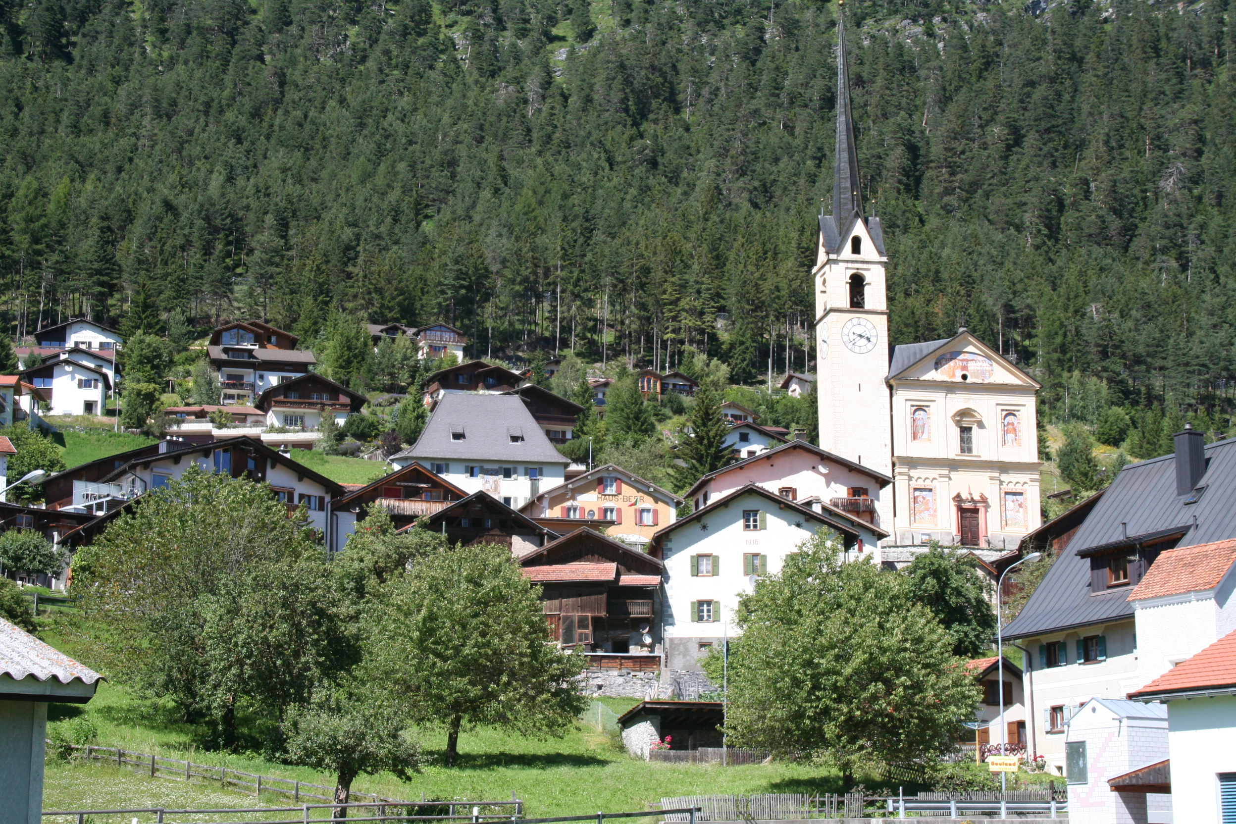 Alvaneu